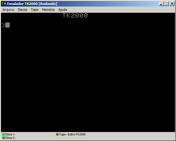 Tela do Boot do TK2000 no emulador